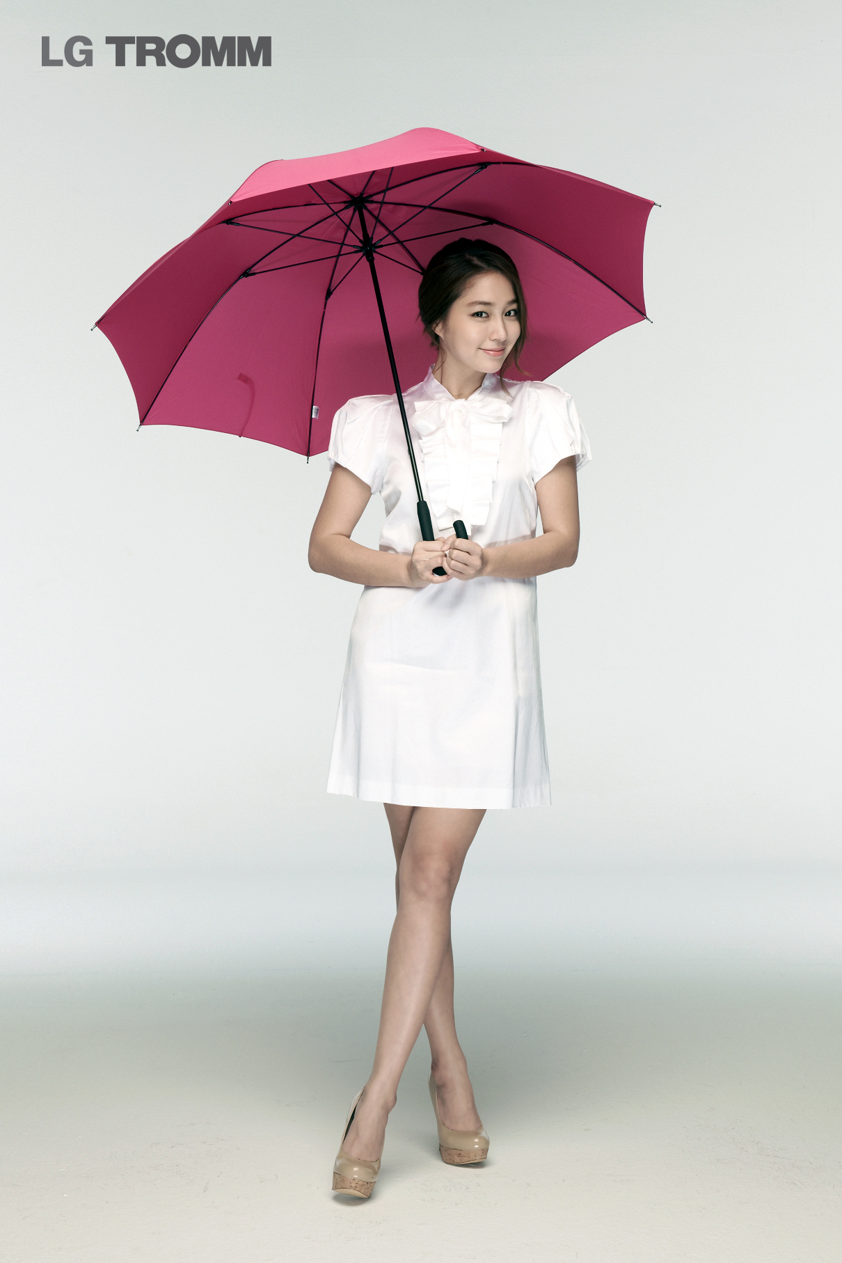 2012년, 6모션은 손빨래다. LG 트롬이 손세탁 그대로~